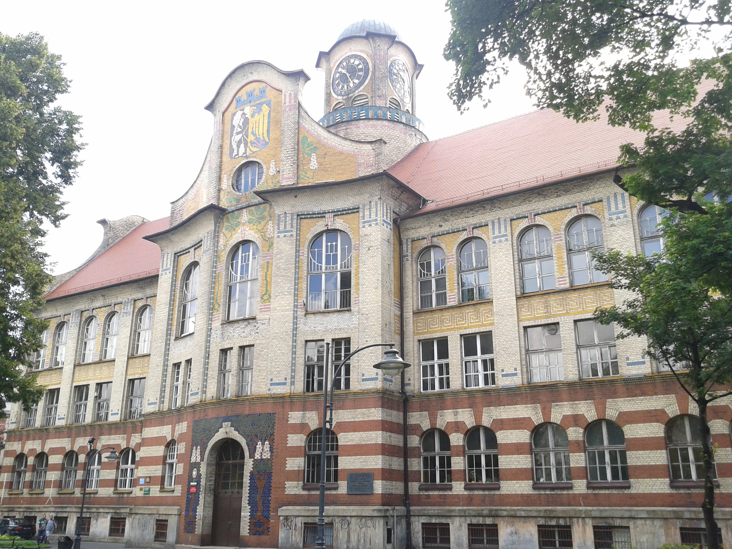 IV LO w Bytomiu